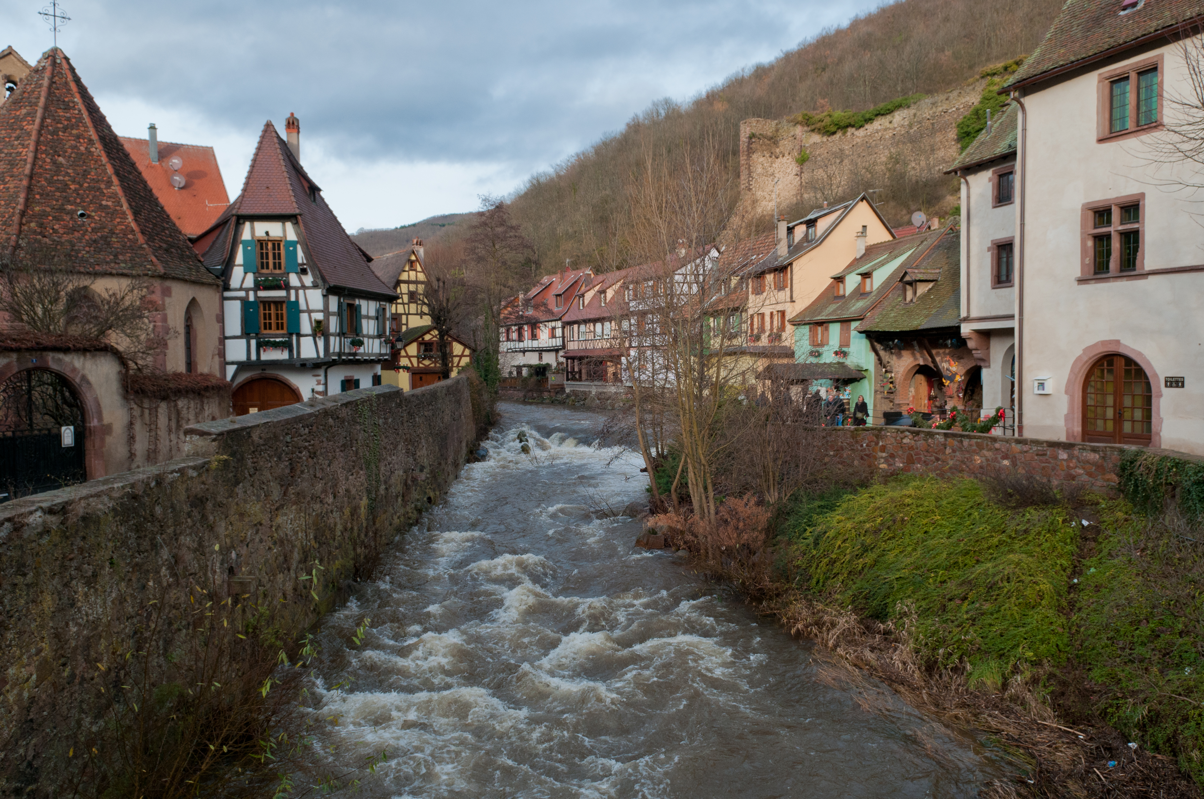 Kaysersberg, Alsace